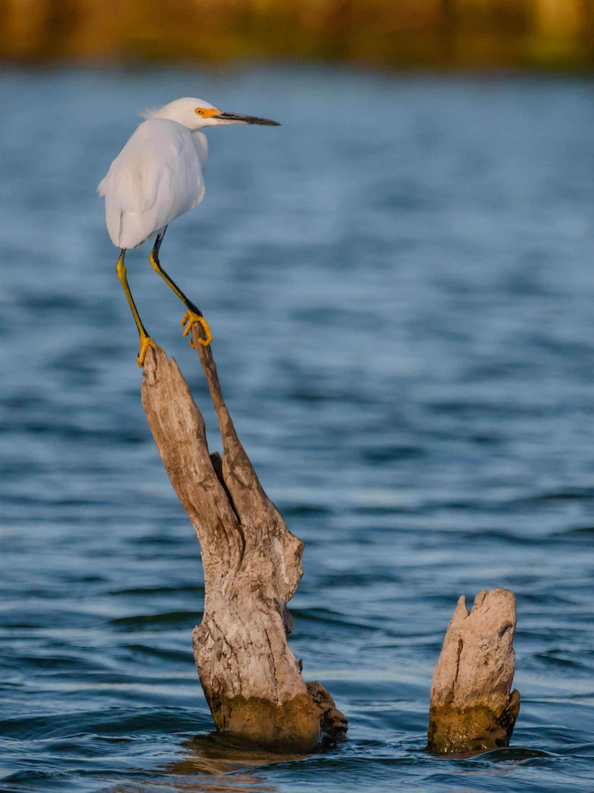 Ave avistada no açude na entrada de Quixadá.